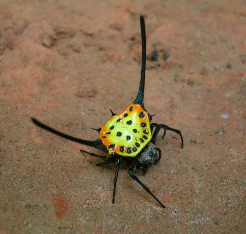 Gasteracantha dalyi Pocock, 1900 from Wayanad (Determiner: Manju Siliwal manjusiliwal at )